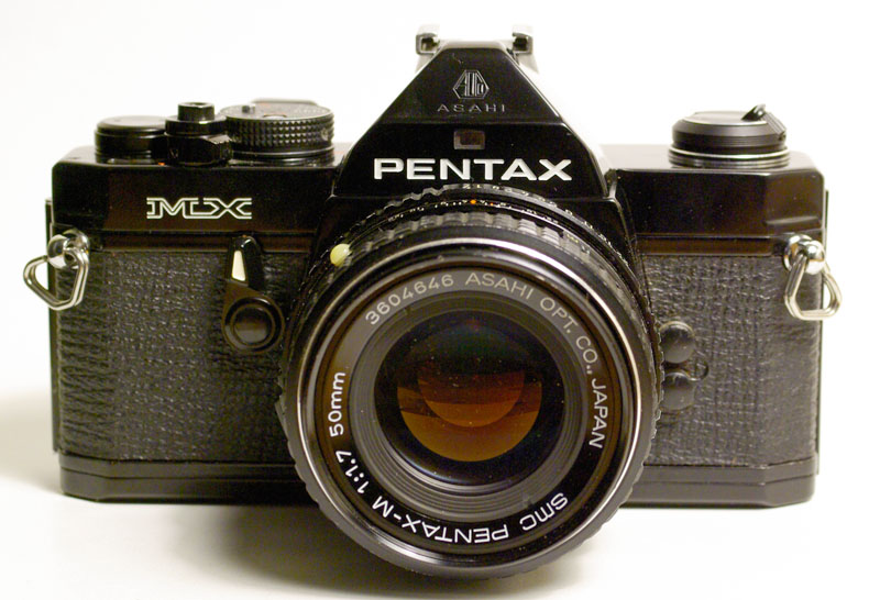 Pentax MX 35mm Camera